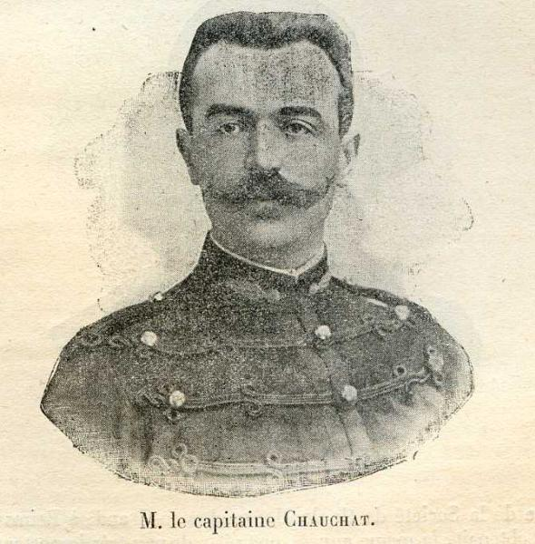 Jacques-Louis-Henri Chauchat